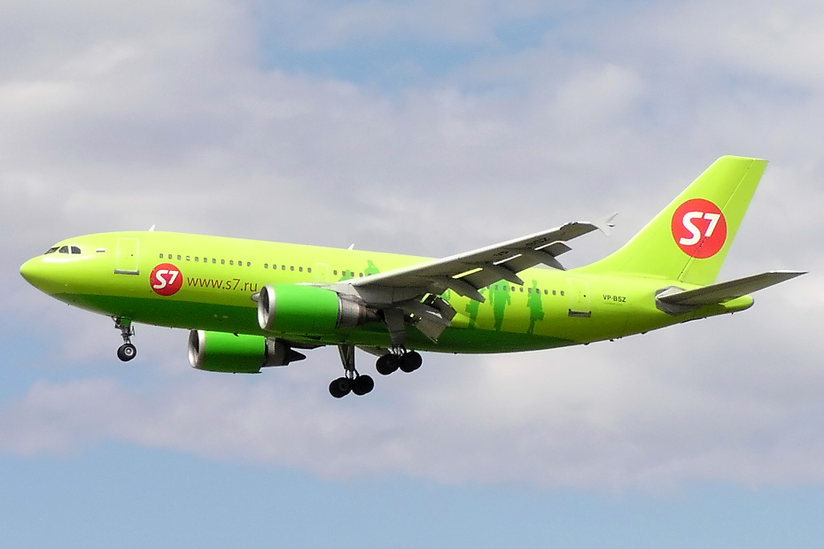 S7 Airlines Airbus A310-200 (VP-BSZ) in Frankfurt (EDDF)